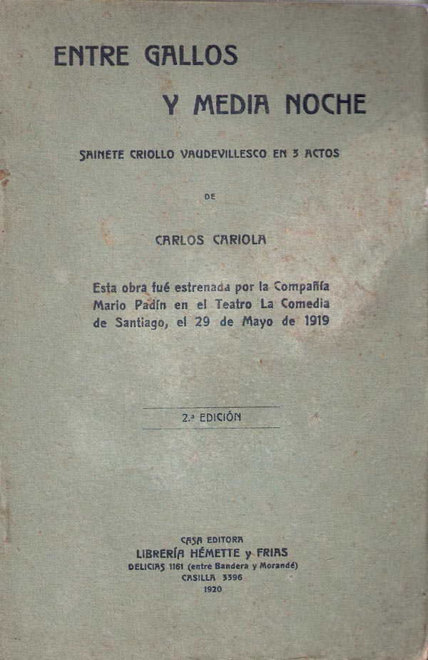 tapa de entre gallos y medianoche de Carlos Cariola, un sainete